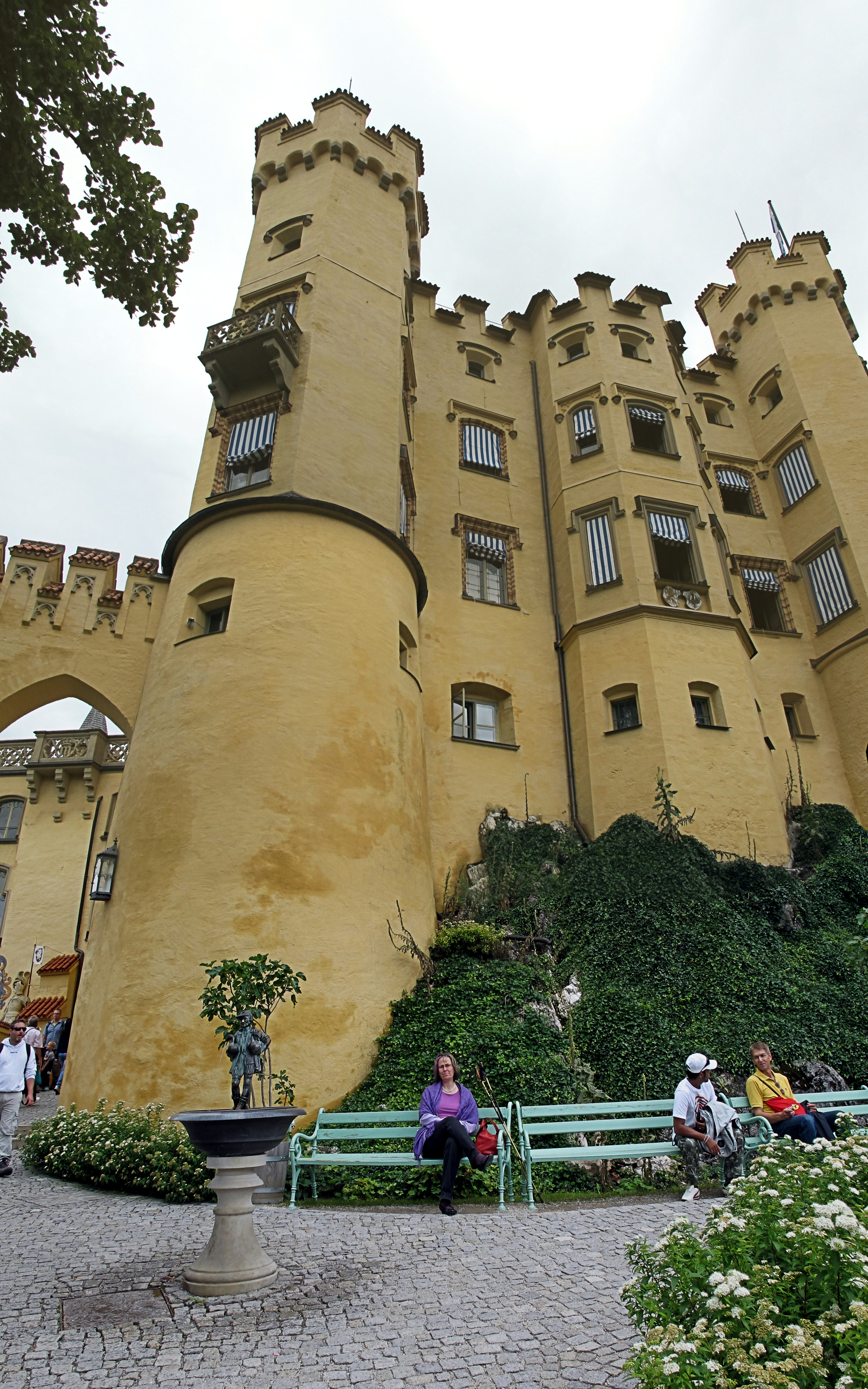 Deutschland, Bayern, Regierungsbezirk Schwaben, Landkreis Ostallgäu, Gemeinde Schwangau, Ortsteil Hohenschwangau, Schloss Hohenschwangau Burghof mit Hans-im-Glück-Brunnen